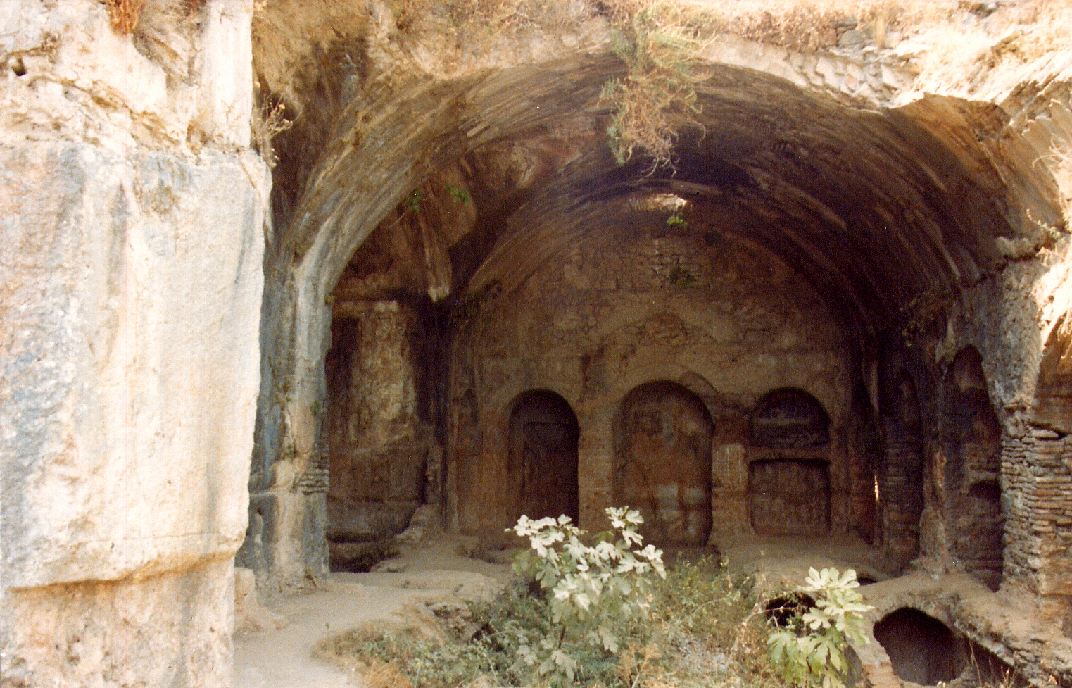 Siebenschläferhöhle bei Ephesos, Westtürkei, Kirche